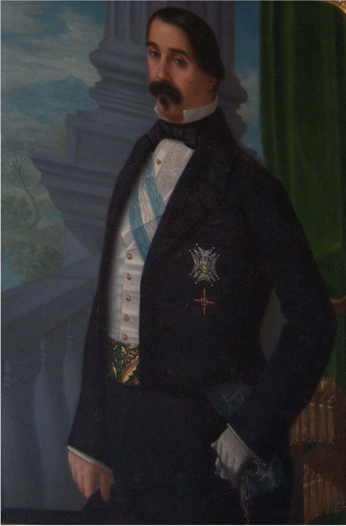 Óleo sobre lienzo Manuel Wssel de Guimbarda 1854.